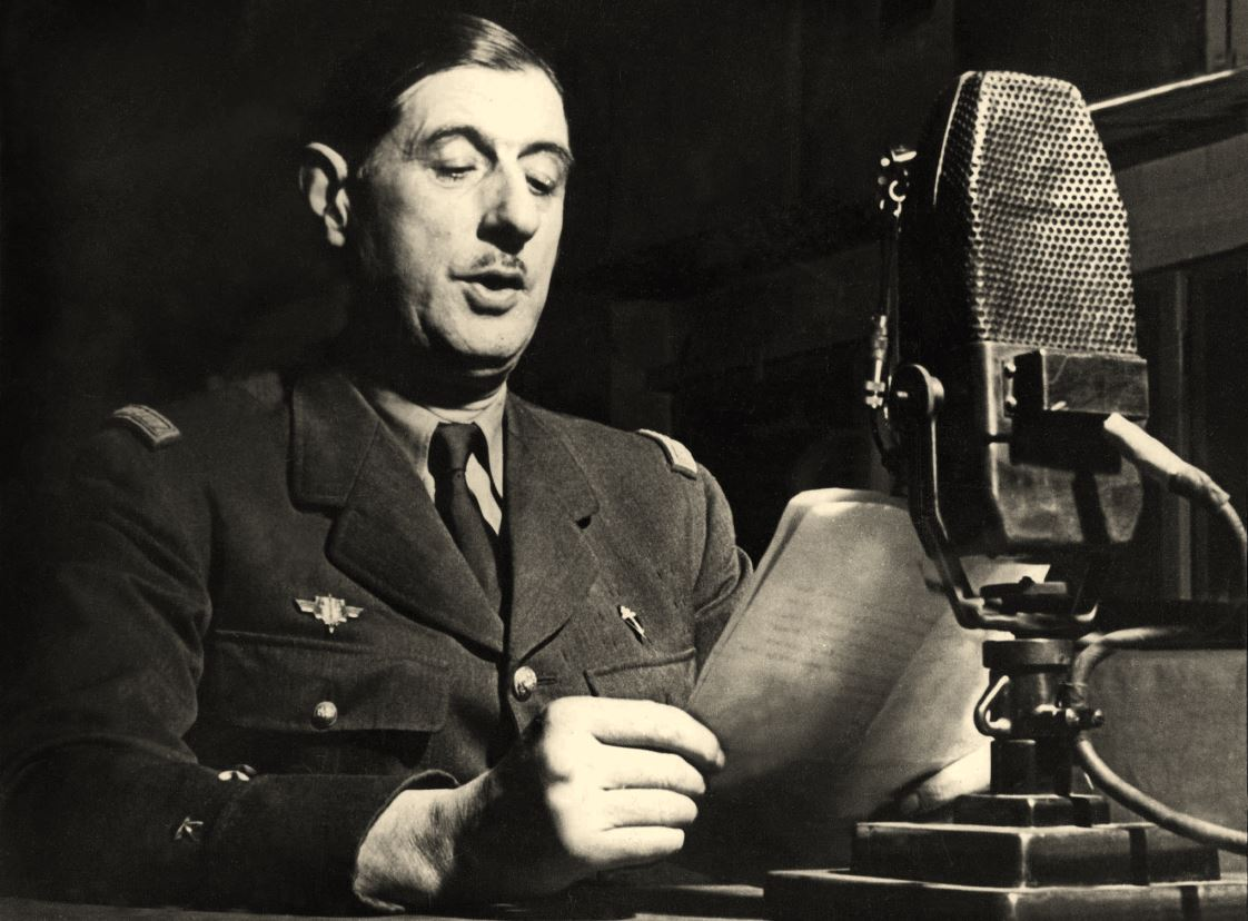 Le général Charles de Gaulle au micro de la BBC à Londres, 1941.